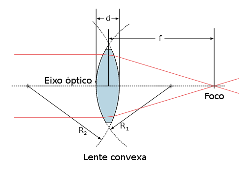 Operação de uma lente convexa.